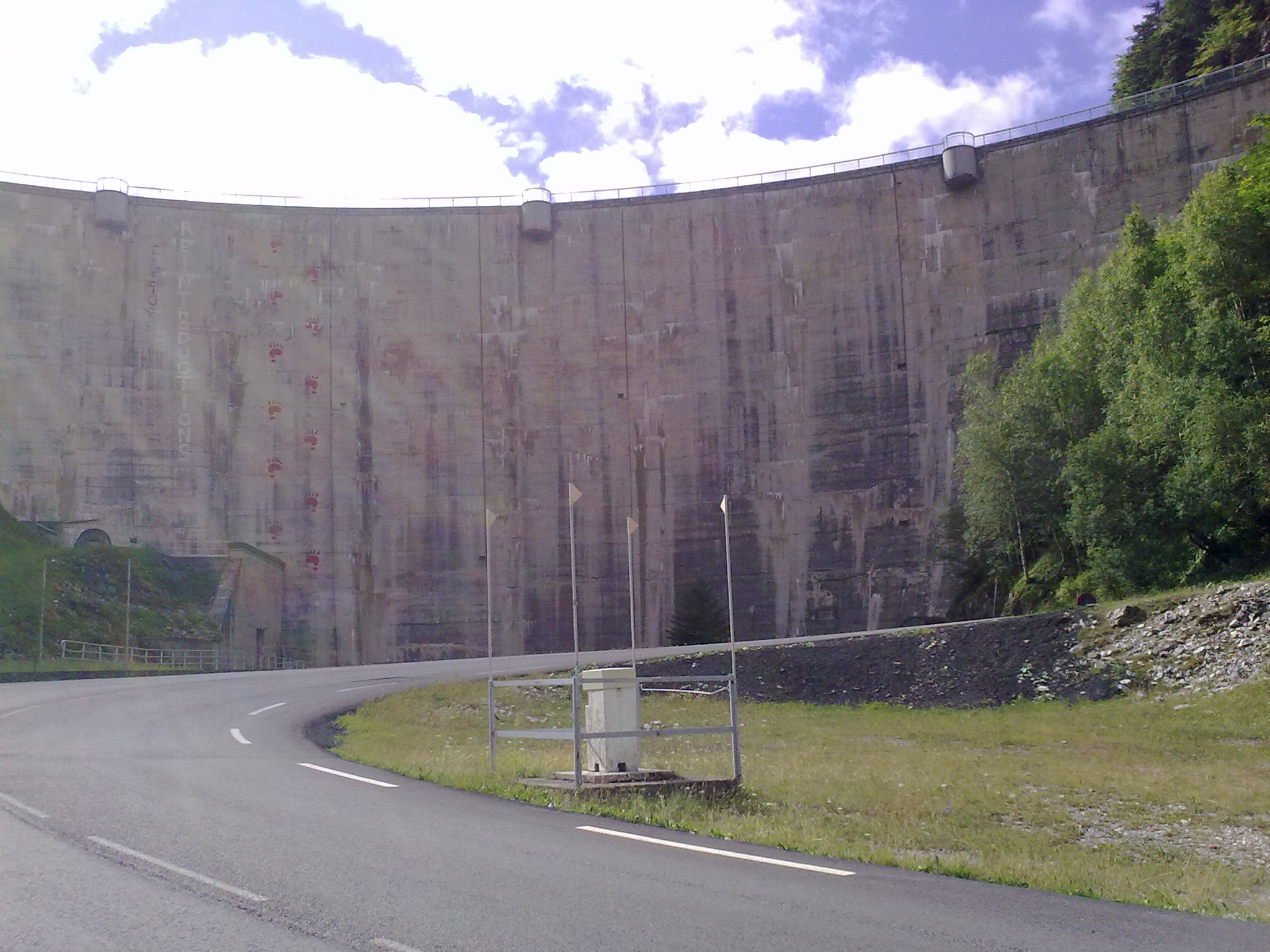 Le barrage de Fabrèges le 25 juillet 2010.